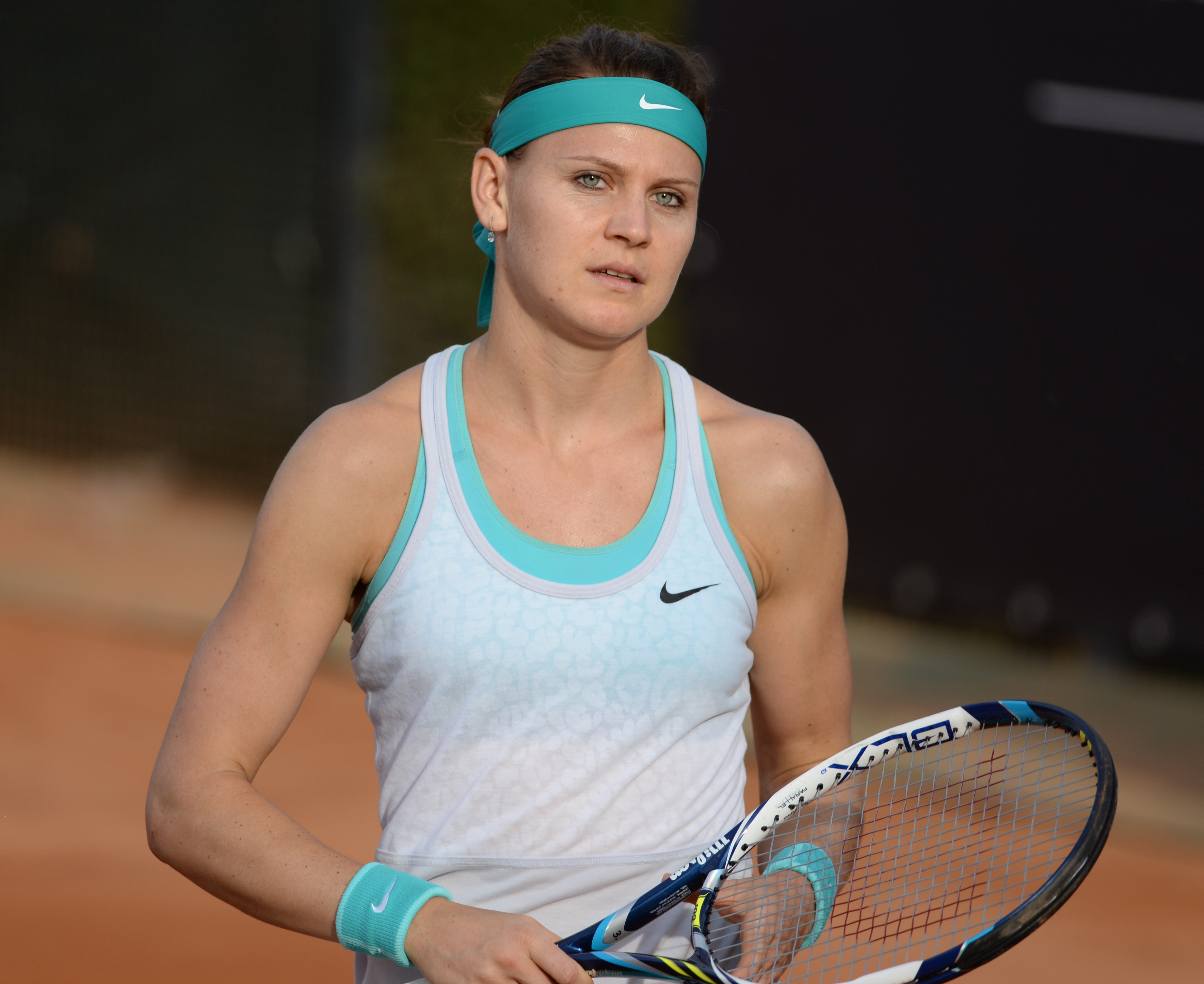 Lucie Safarova